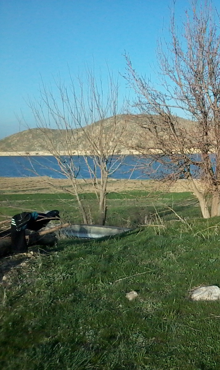 Kurdî: آلکلو سد کاظمی-ئاڵکەڵوو بەندئاوی کازمی